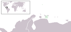 Description:Carte de localisation de Klein Curaçao, Antilles néerlandaises, Pays-Bas Auteur:Rémih à partir d'une carte du CIA WorldFactBook